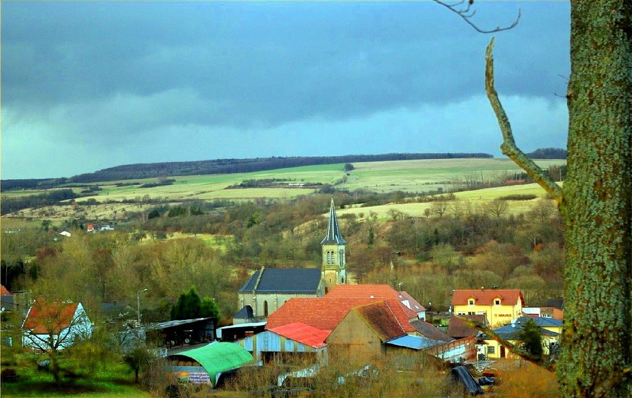 Blies-Ébersing